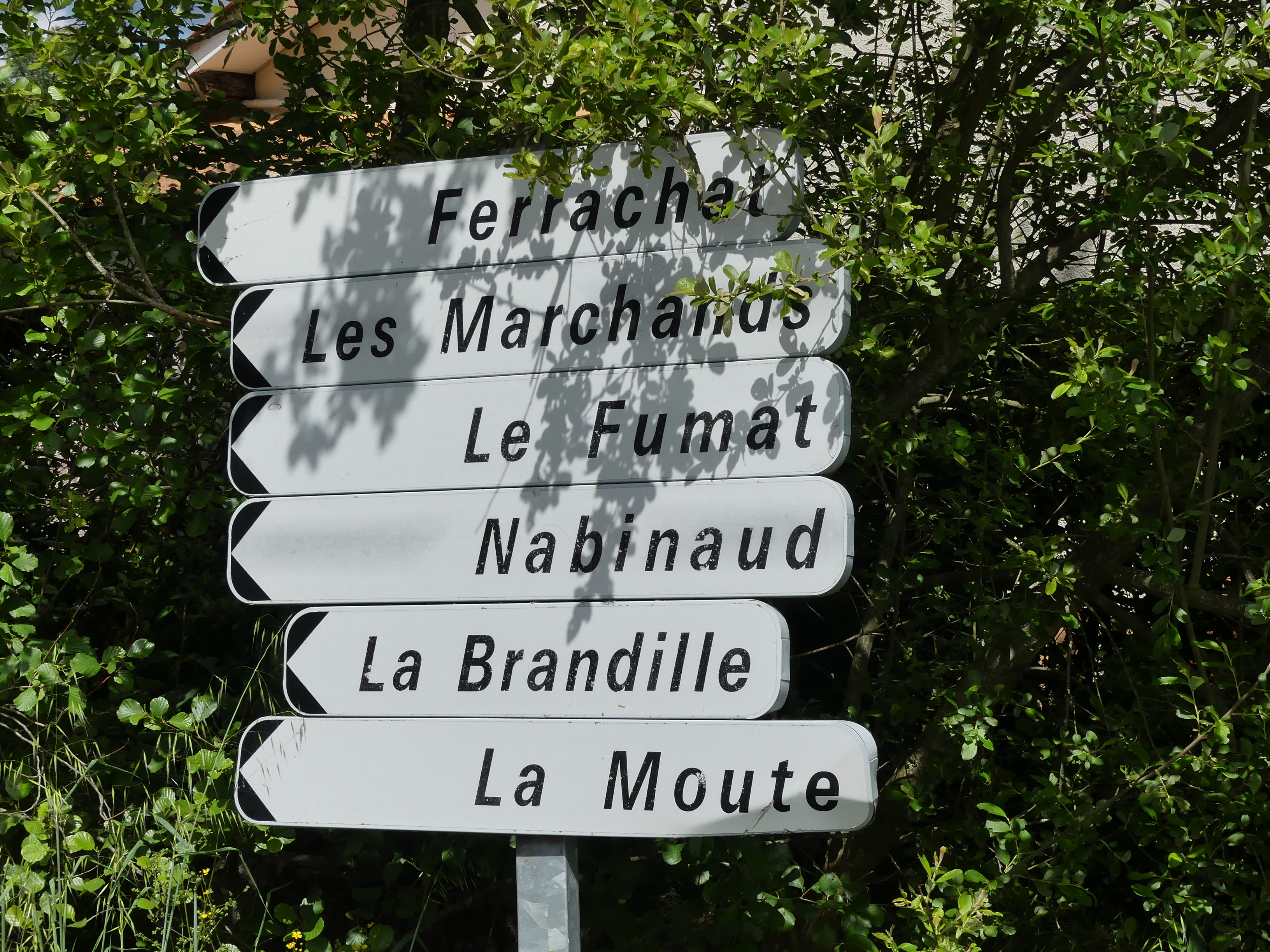 Panneaux indiquant six lieux-dits, commune du Pizou, Dordogne, France.